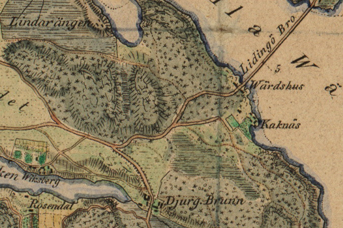 Lidingö Bro och Kaknäs gård